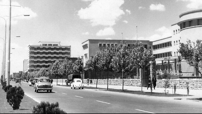 خیابان آزادی، تهران، ایران، دهه ۱۳۴۰ شمسی